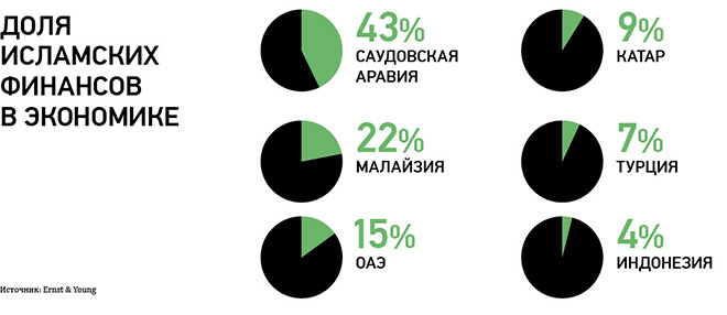 Доля исламских финансов в экономике